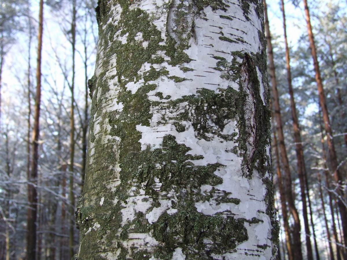 Betula pendula, Kampinoski Park Narodowy, Poland